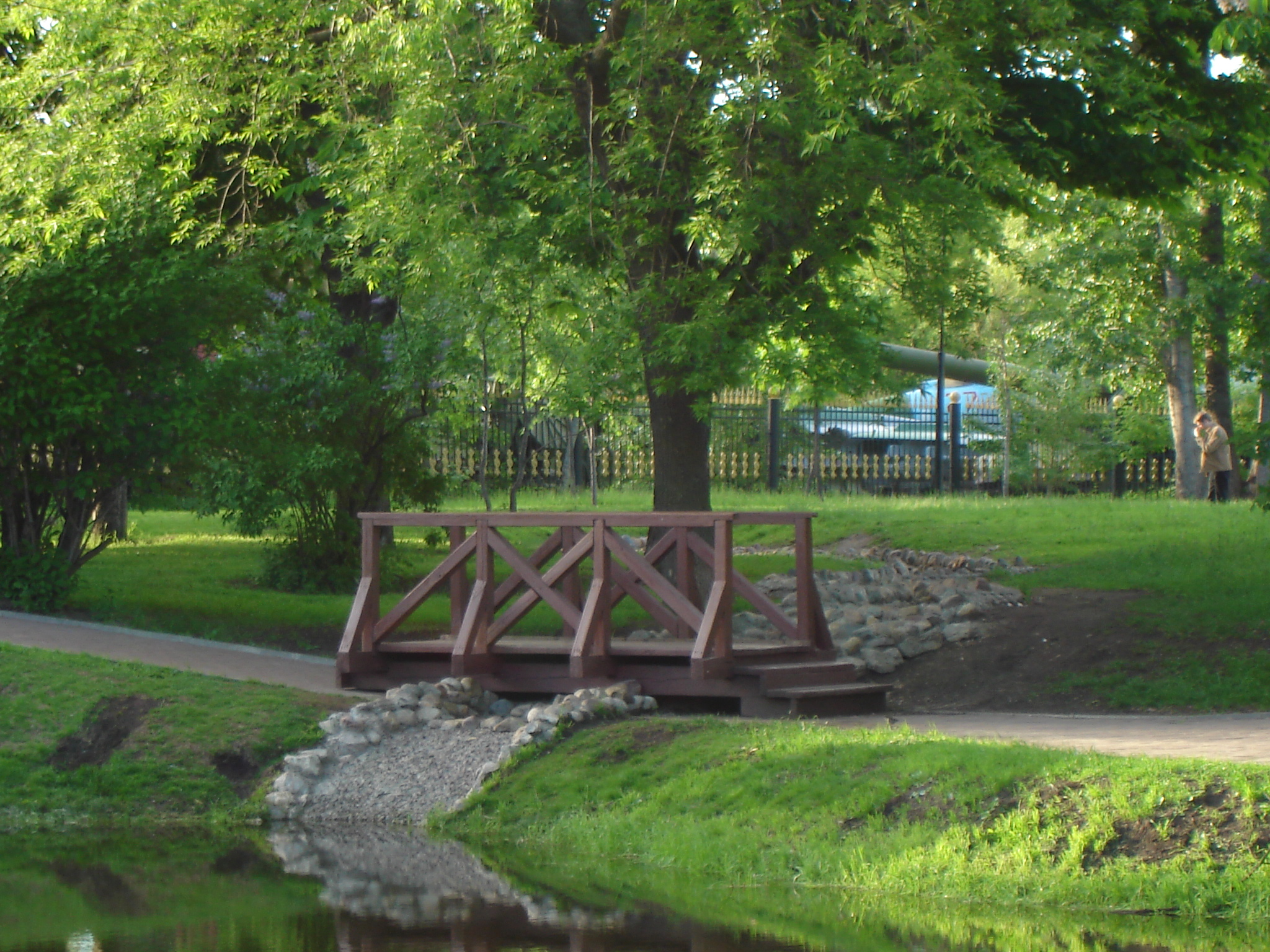 Мостик